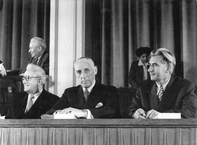 Illus Sturm Kno-BeJst.15.11.1950 Neue Regierung der Deutschen Demokratischen Republik gebildet. Am 15.11.1950 trat die Volkskammer zu ihrer 2. Plenarsitzung zusammen. Auf der Tagesordnung stand die Erklärung des Ministerpräsidenten über die Bildung und das Programm der Regierung der DDR. UBz: V.l.n.r.: Minister Handke, Minister Reingruber und Minister Wandel. LeihweiseIllus Berlin W8